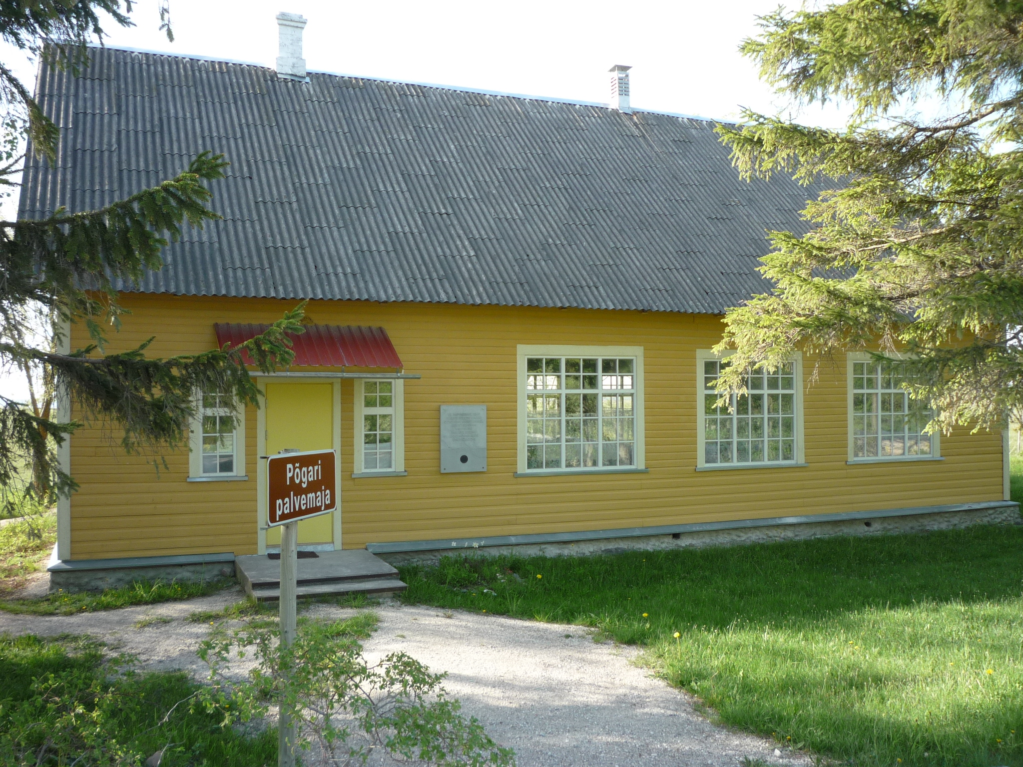 Põgari palvemaja. Koht, kus Otto Tiefi valitsus pidas viimase istungi 22. septembril 1944. Tuuru-Puise tee 1. kilomeetripunkti kõrval. Põgari-Sassi küla, Ridala vald, Lääne maakond, Eesti.